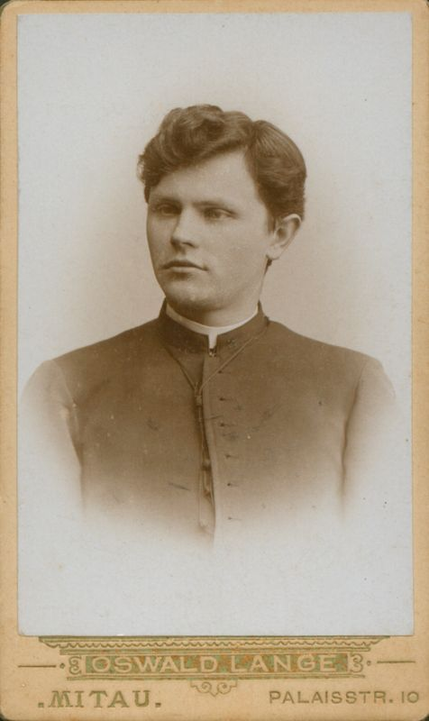 Juozas Tumas-Vaižgantas in Mitau